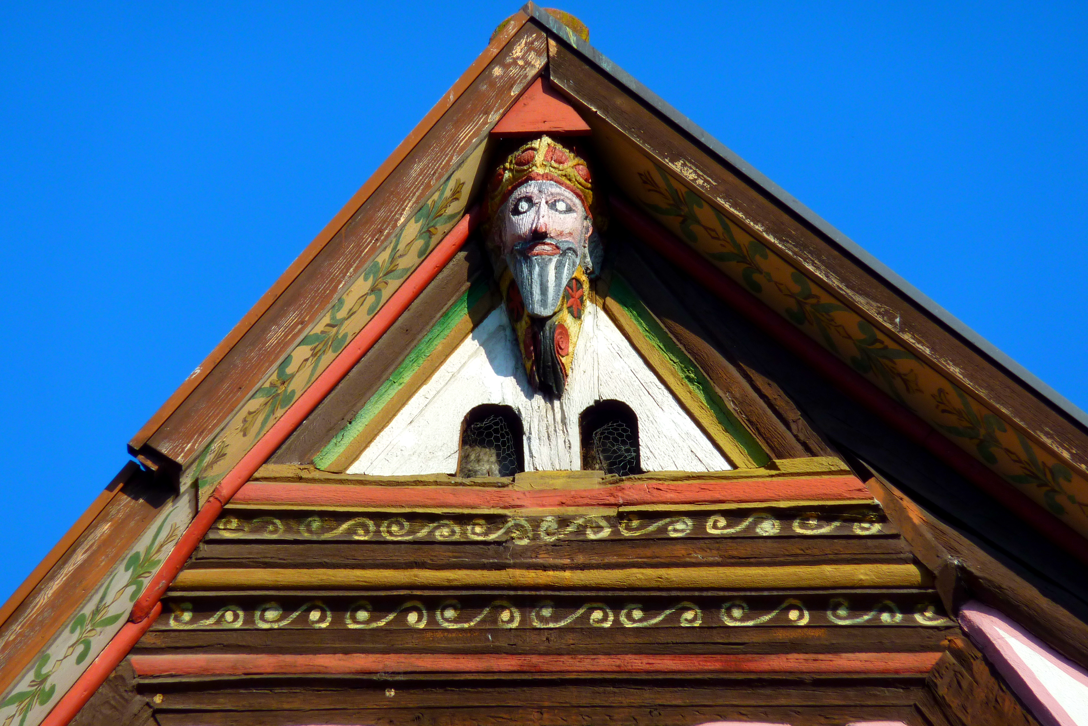 Gasthaus Sonne in Oberderdingen, Amthof 2